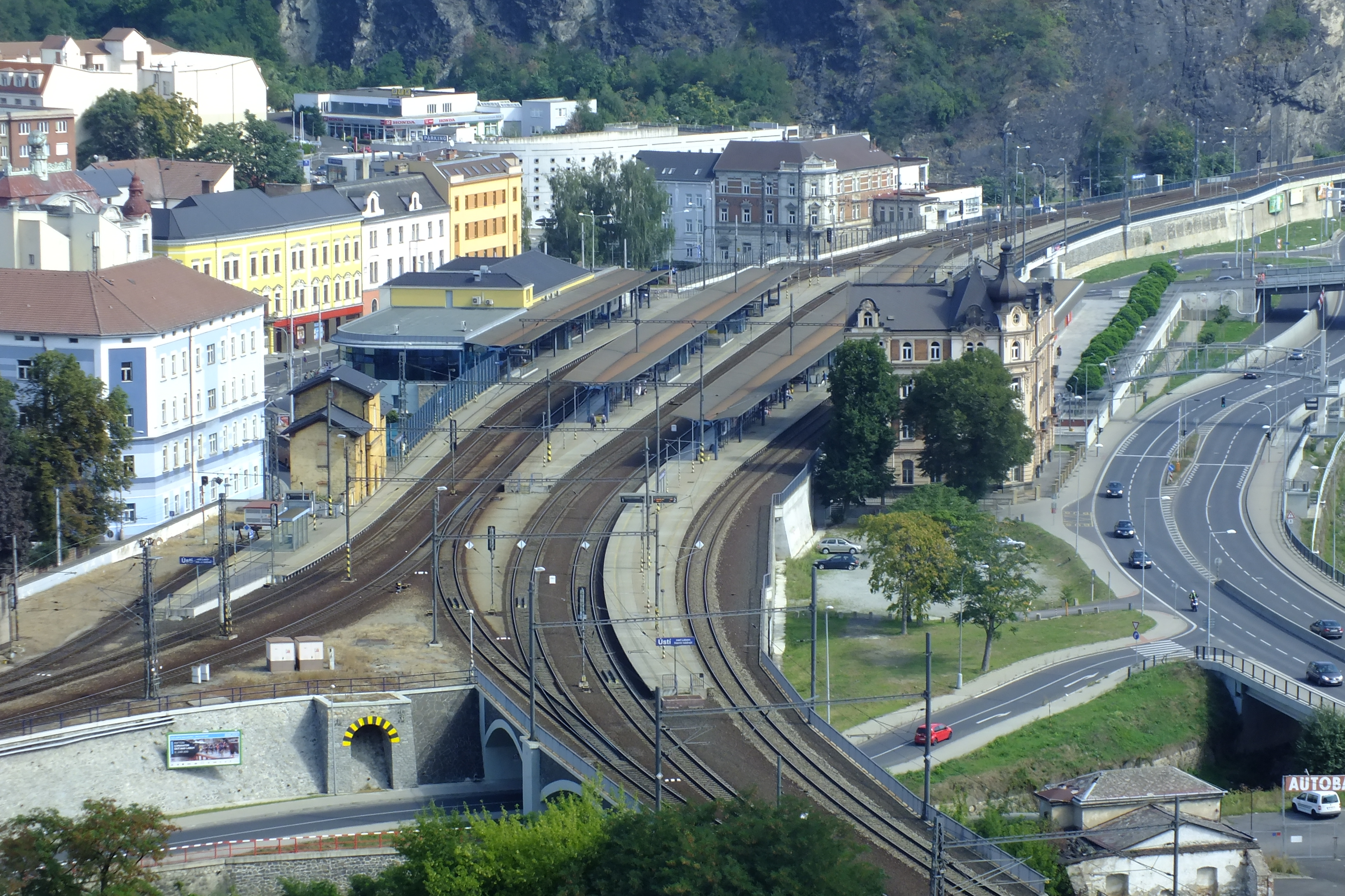 Nádraží Ústí nad Labem hlavní nádraží